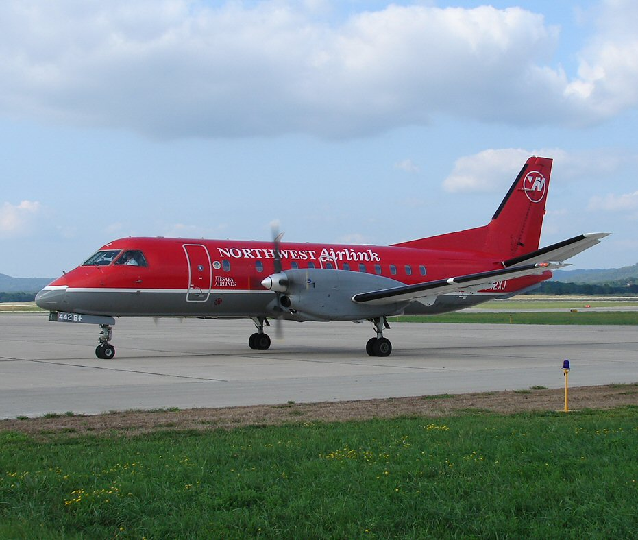 good evening Mesaba 2718!